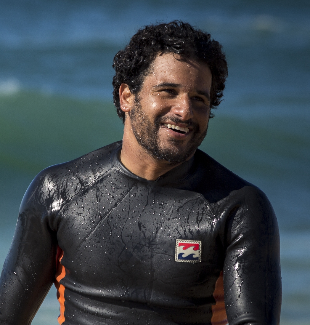 Ítalo Ferreira lors du Quiksilver Pro France 2017 à Hossegor (France).